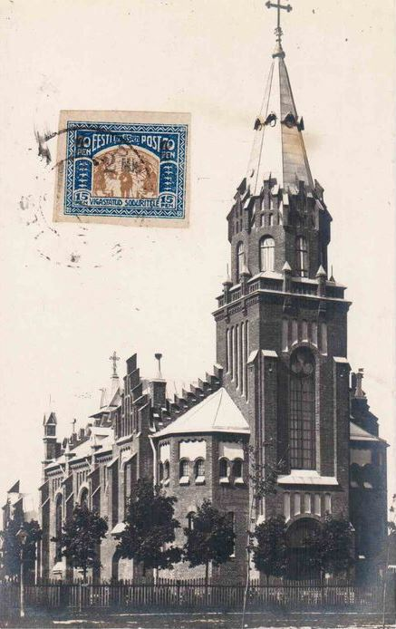 Narva Püha Antoniuse kirik 1920. aastatel